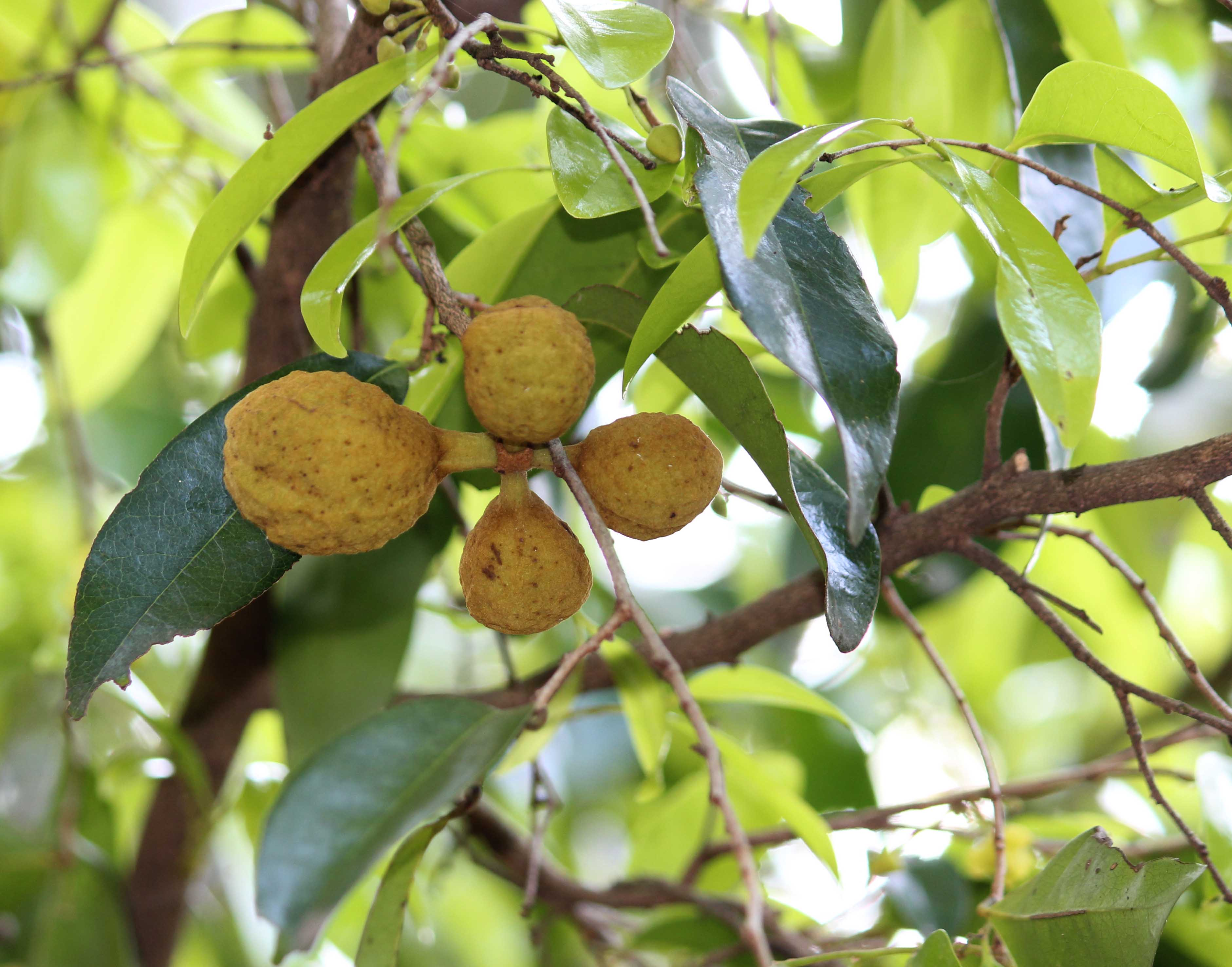 തുട്ട